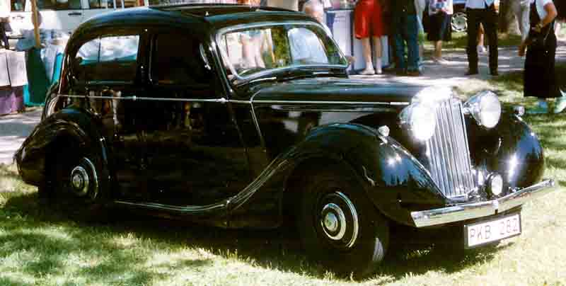 Sunbeam-Talbot Saloon 1947